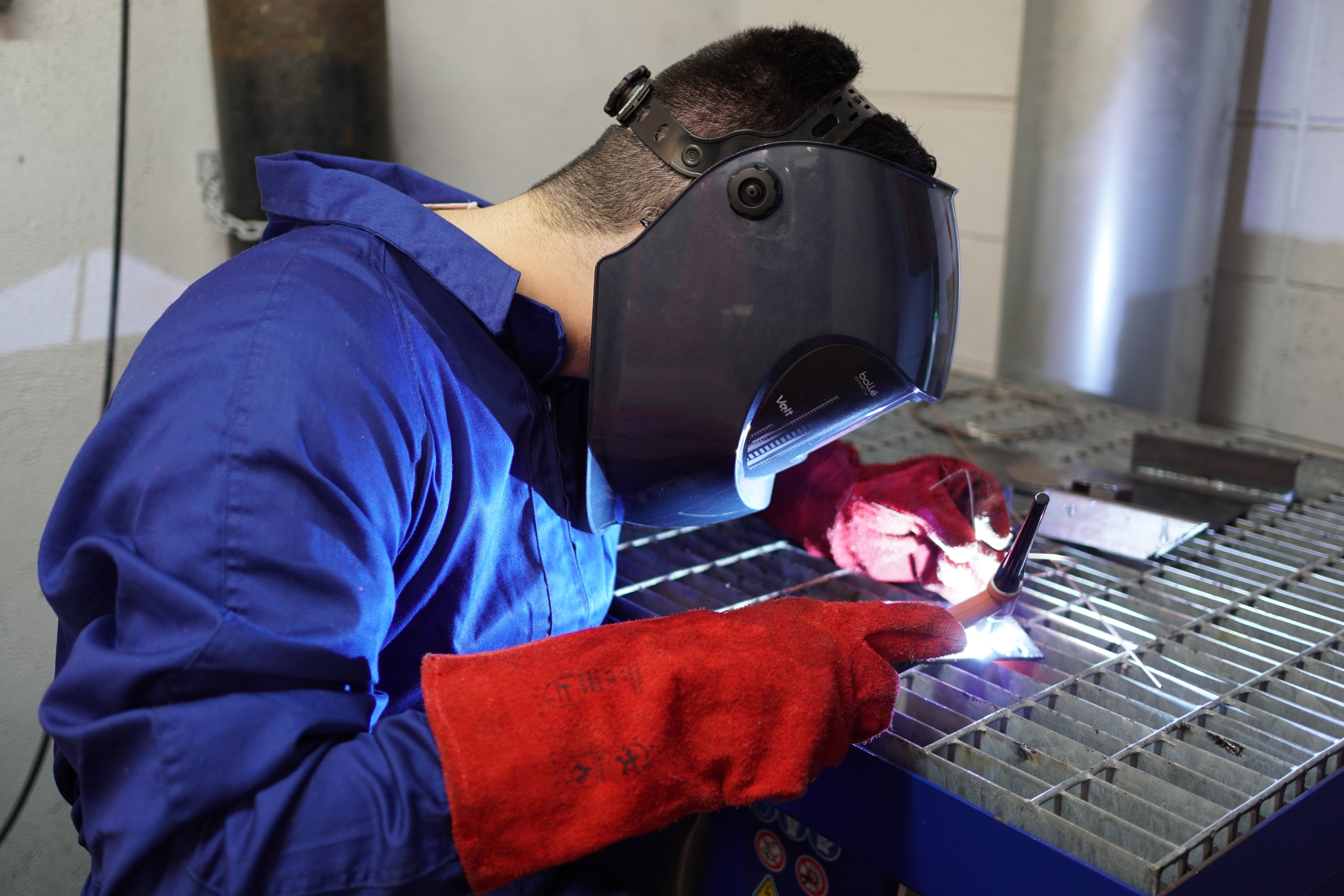 Torxa amb tots els seus elements (Tovera, difusor, pinza i capçal) i alguns dels EPI necessaris per soldar amb seguretat